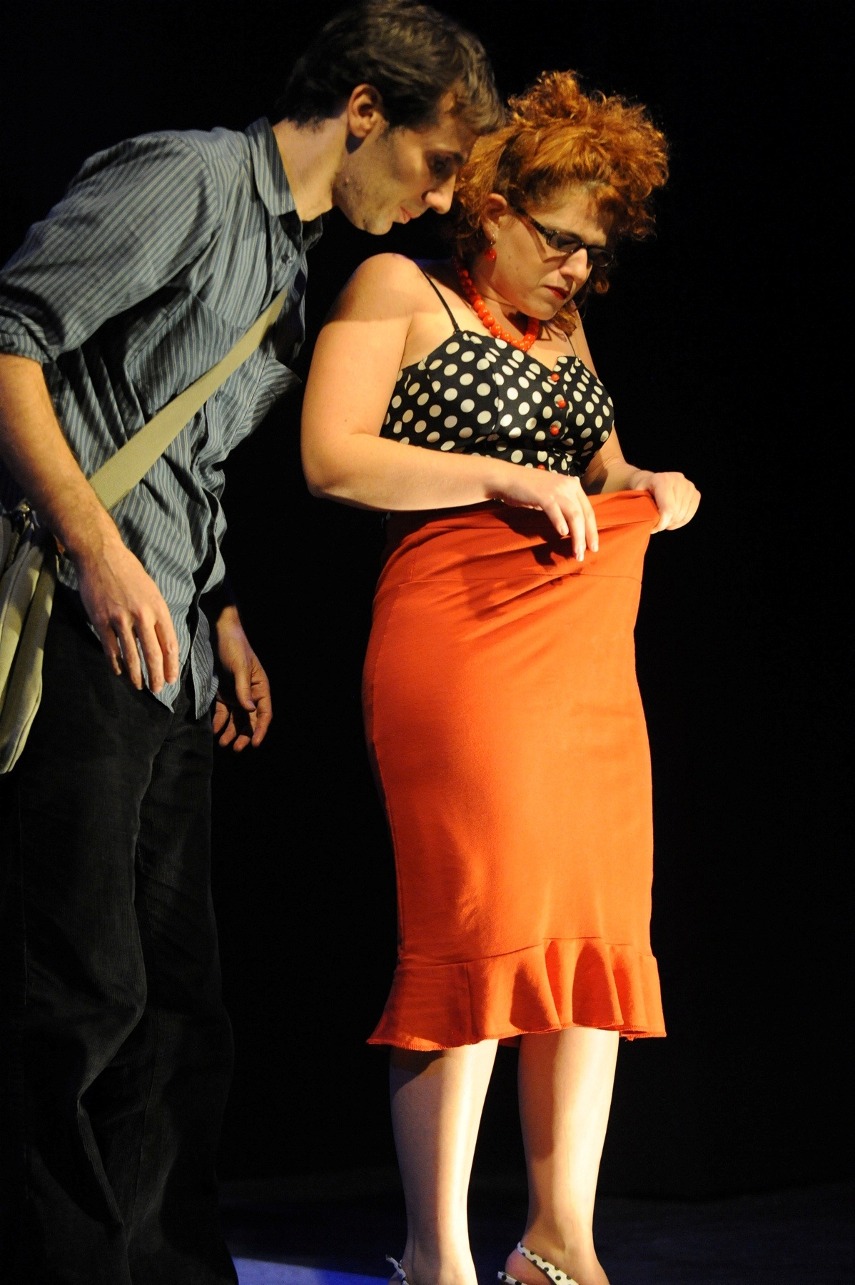 התחתונים של שמרית